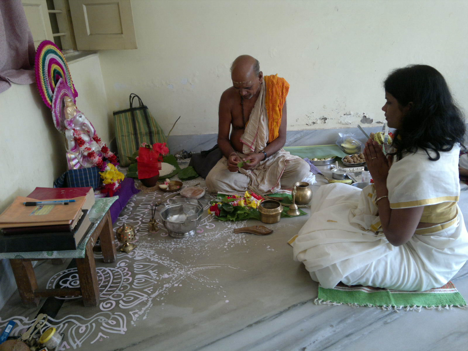 Puja, pooja in progress Inside home, Ganesh Orissa, India 2012